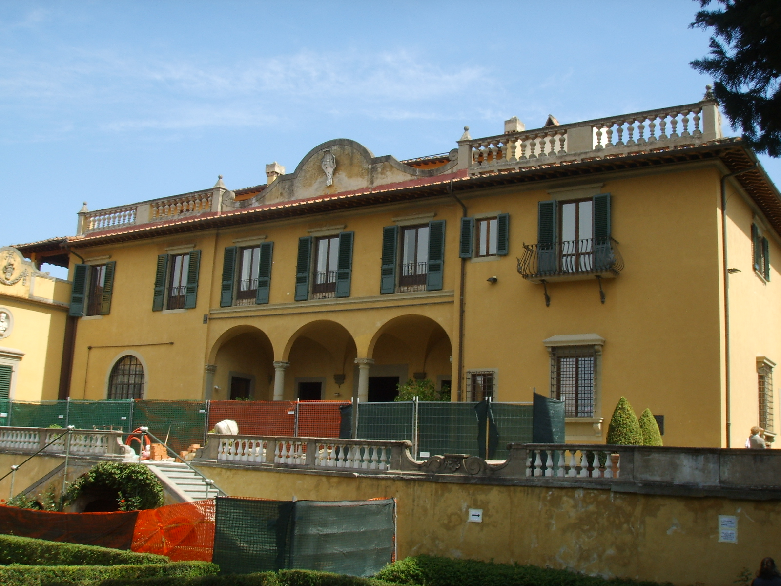 Villa schifanoia